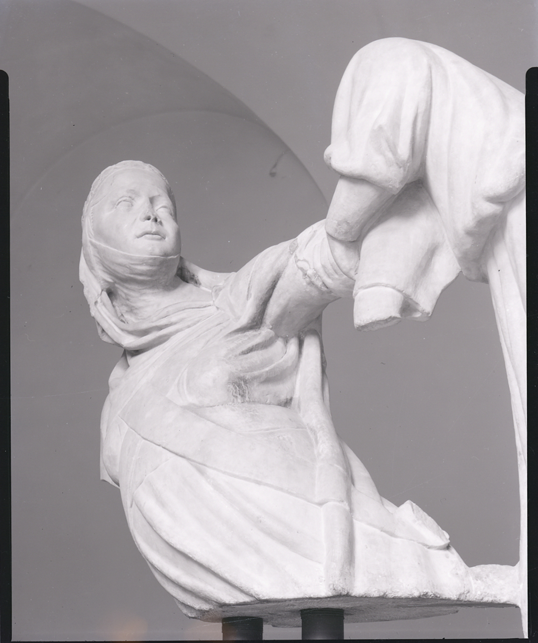 Genova. Galleria di Palazzo Bianco. Giovanni Pisano, "Monumento funebre a Margherita di Brabante", 1313-1314, frammento in marmo con la defunta sollevata dalla tomba da due angeli-diaconi, su supporto mobile metallico. Oggi conservato al Museo di Sant'Agostino, Genova.Servizio fotografico : Genova, 1965 / Paolo Monti. - Buste: 5, Fototipi: 5 : Negativo b/n, gelatina bromuro d'argento/ pellicola ; 10x12. - ((Serie costituita da 5 buste sciolte di negativi identificati con i nn.: 10501, 10502, 10503, 10504, 10505. - Oggi conservato al Museo di Sant'Agostino, Genova. - Occasione: Documentazione della Galleria di Palazzo Bianco. - Fonte: Agenda di Paolo Monti: Monti/ 2/ 6 giugno 1964 - 31 marzo 1966/ 8194-12420 (1964-1966), presso Archivio Paolo Monti. - Fonte: Fattura di Paolo Monti: IV. Commesse/ Fattura n. 15 (1967/02/28), presso Archivio Paolo Monti. 4 riprese fotografiche Linhoff 10x12 sculture Palazzo Bianco foto 10500/502, 10503/505